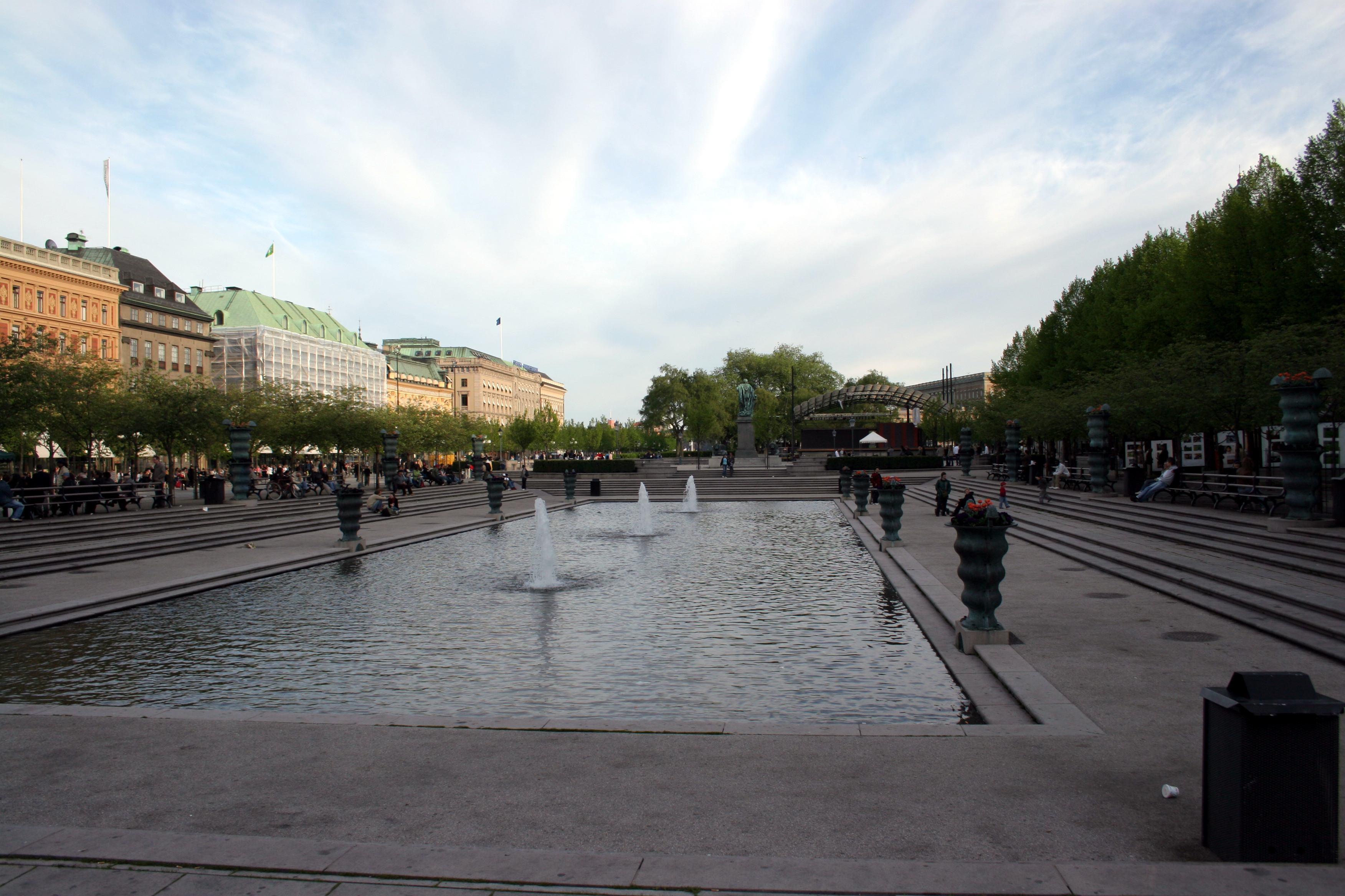 Kungsträdgården, Stockholm, Sweden.